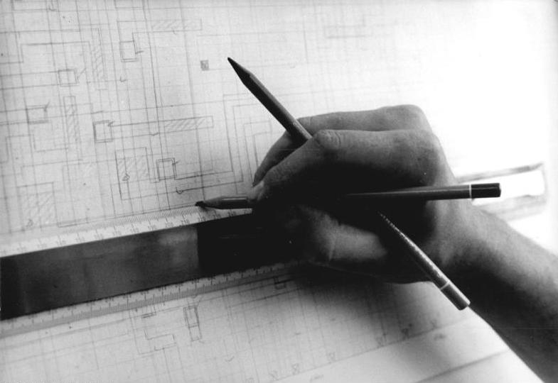 Konstruktionsplan ADN-ZB Hirndorf 23.5.89 Erfurt: DDR-Zeugnisse - Dominierte bei der Entwicklung des Mikroprozessors U 808 noch das Reißbrett, bereiten derzeit die Elektroniker mittels Computertechnik die vorfristige Aufnahme der Serienproduktion eines neuen 16-Bit-Mikroprozessors vor. Er kann bis zu 2, 5 Millionen Operationen pro Sekunde ausführen, übertrifft den bisher hergestellten damit um das Dreifache und besitzt eine große Zahl zusätzlicher Einsatzmöglichkeiten. (Siehe auch Fotos 1989-0523-15, 17 und 18N)